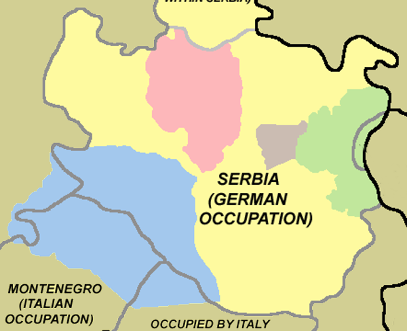 Srpskohrvatski / српскохрватски: Zone odgovornosti četničkih komandanata u okupiranoj Srbiji, prema sporazumu sa Nemcima 1943. godine. Jevrem Simić i Nikola Kalabić (roze), Vojislav Lukačević (plavo), Ljuba Jovanović Patak (zeleno) i Mihailo Čačić (sivo).